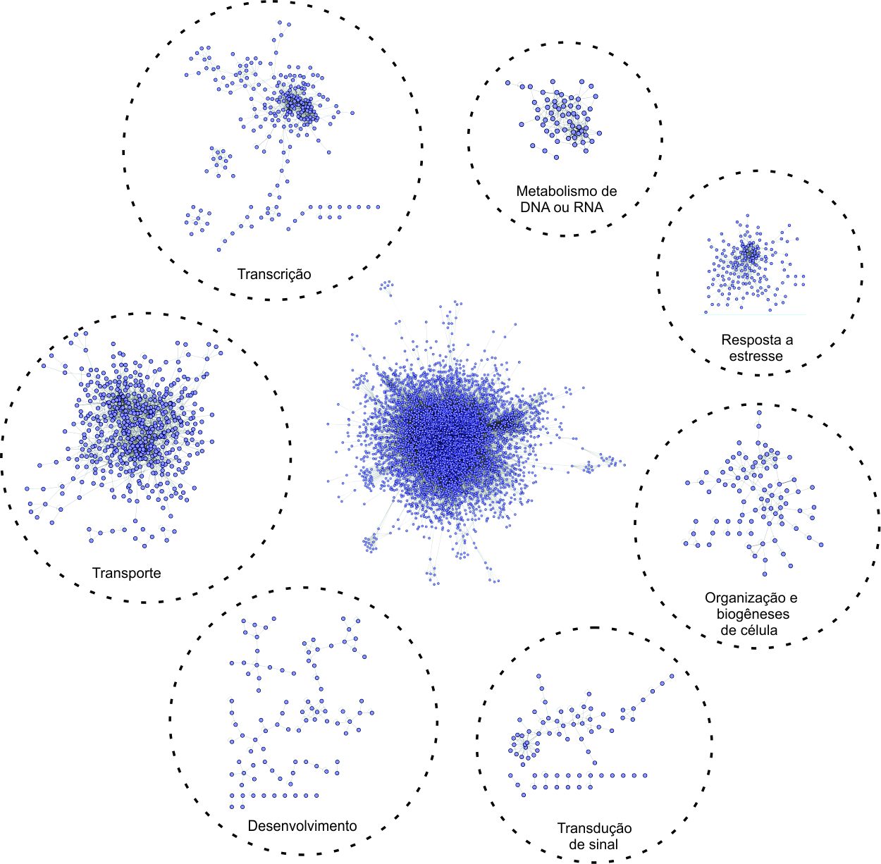 as